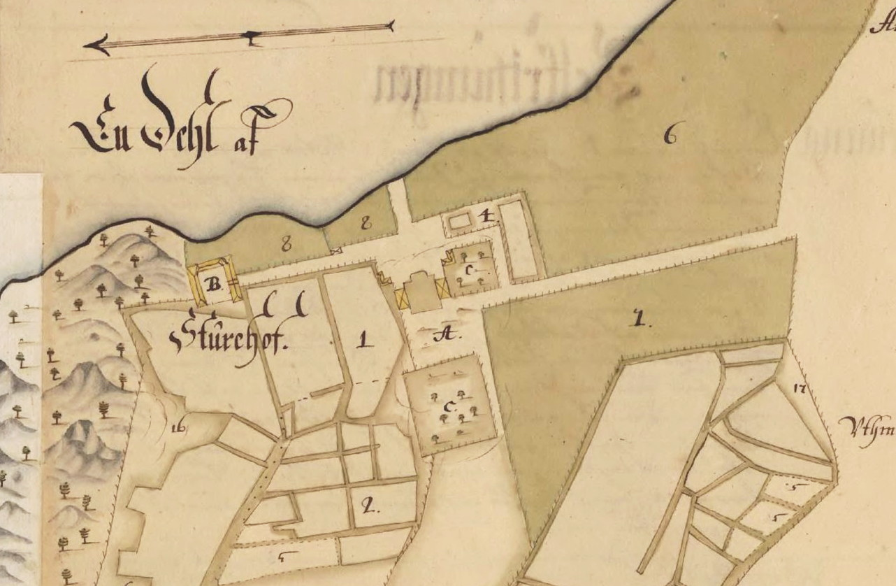 Karta över Sturehov